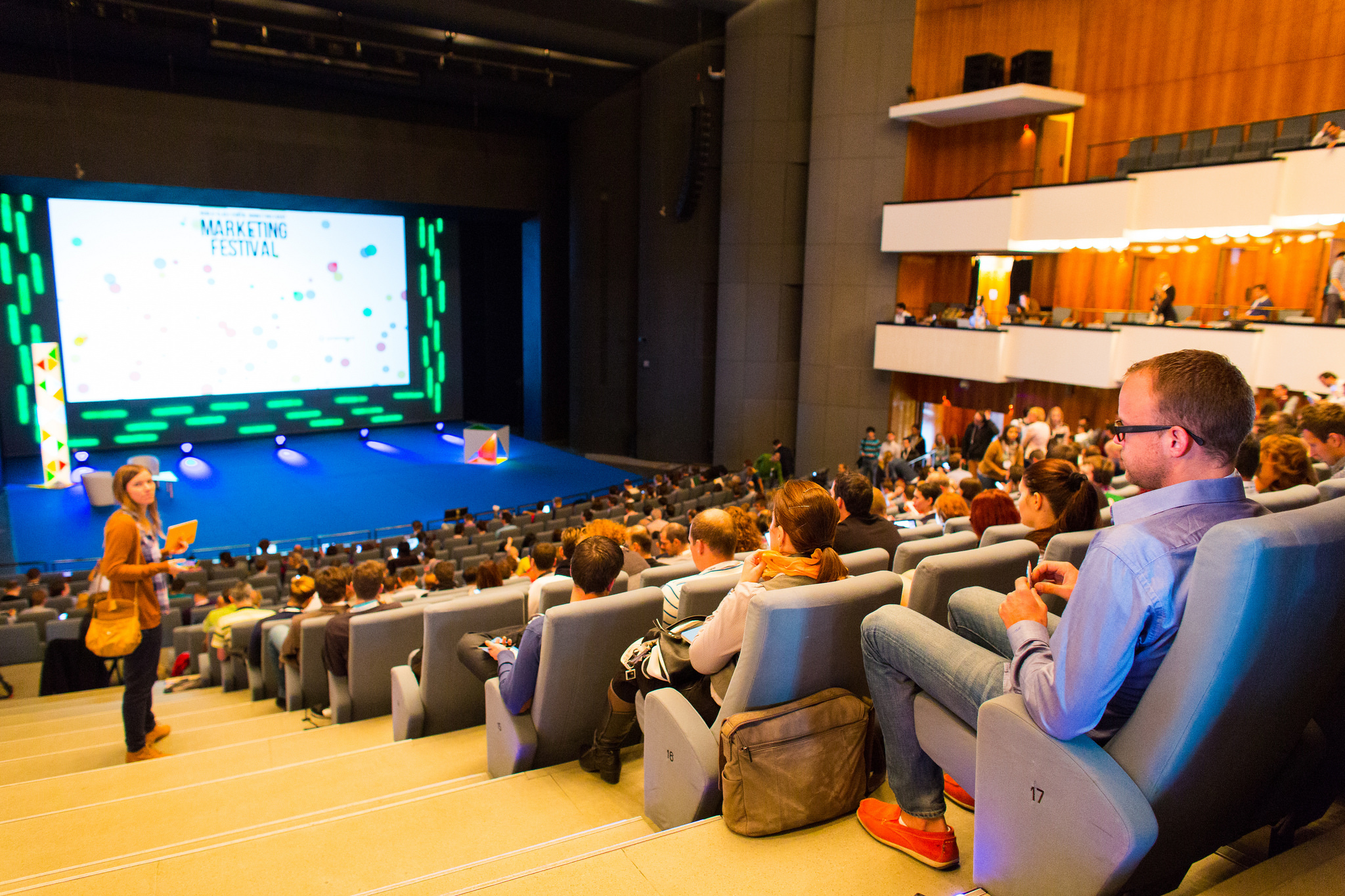 Fotografie z Marketing Festivalu